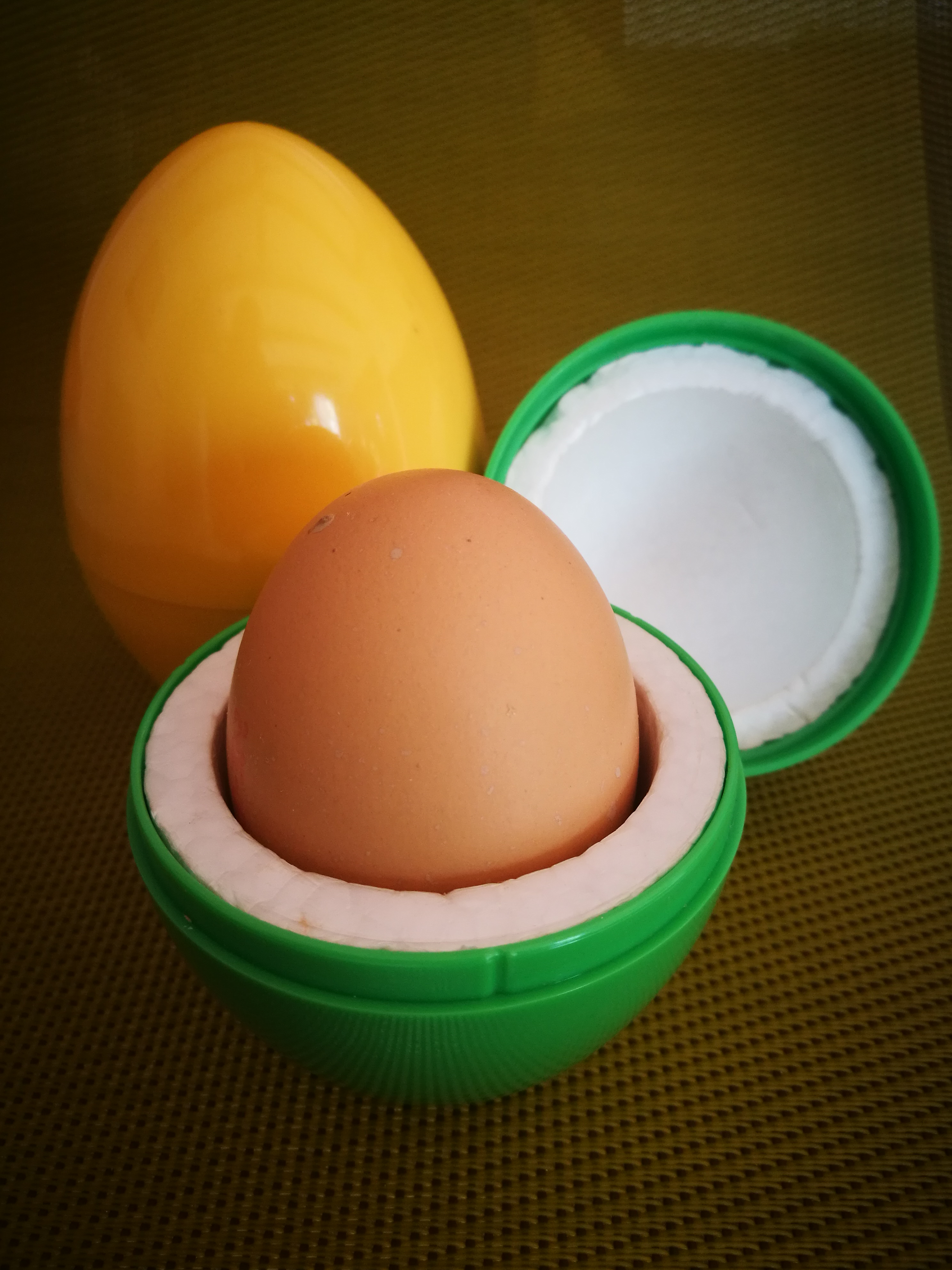 Eierwärmer aus zwei mit Polystyrol isolierten Kunststoffhalbschalen